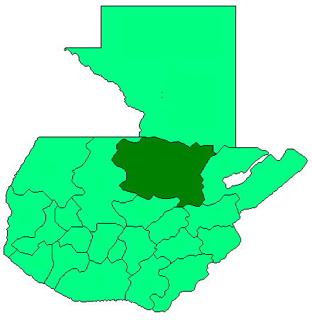 Alta Verapaz